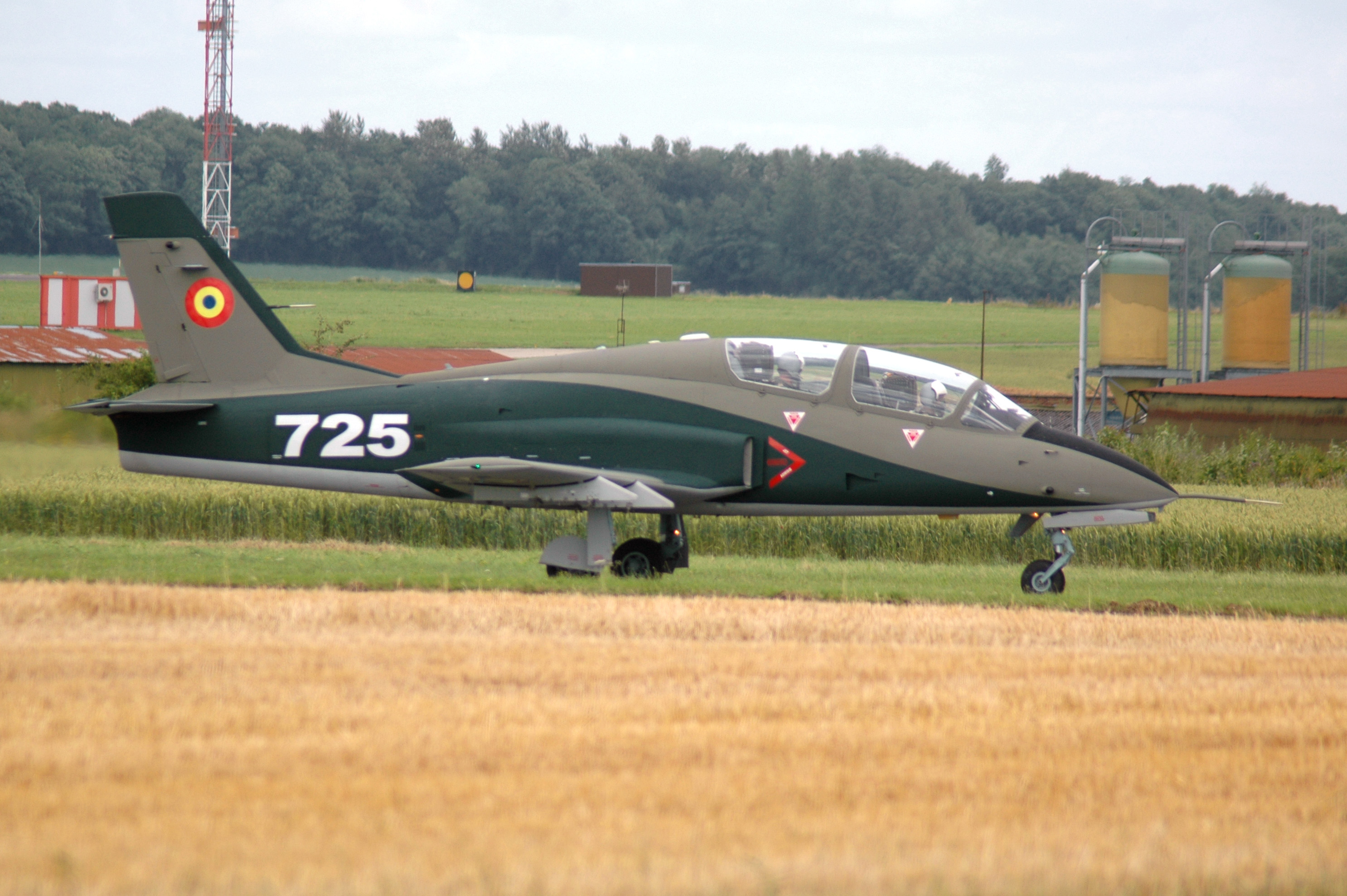 Présentation en vol lors des Belgian Defense Days à Florennes (EBFN)